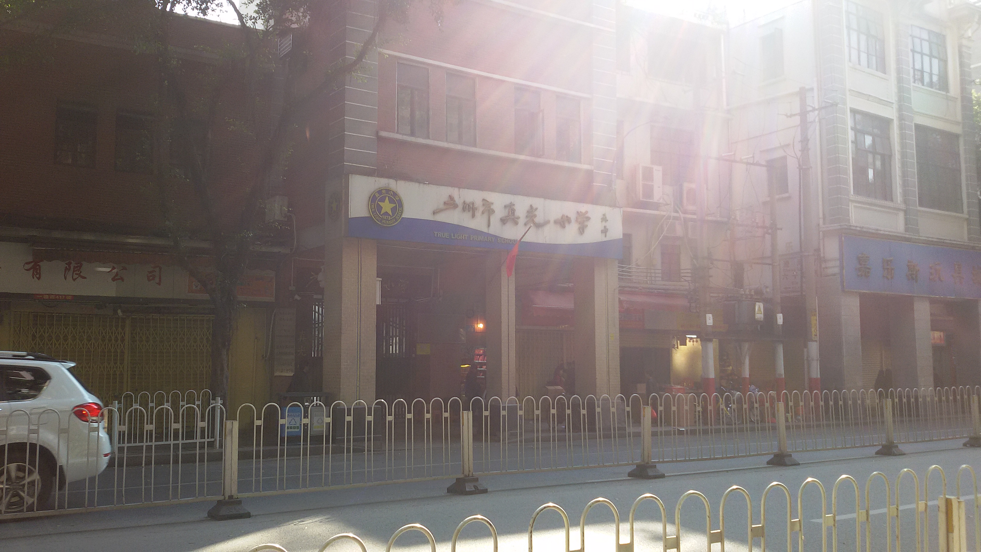 粵語: 广州市真光小学（1868～2017）